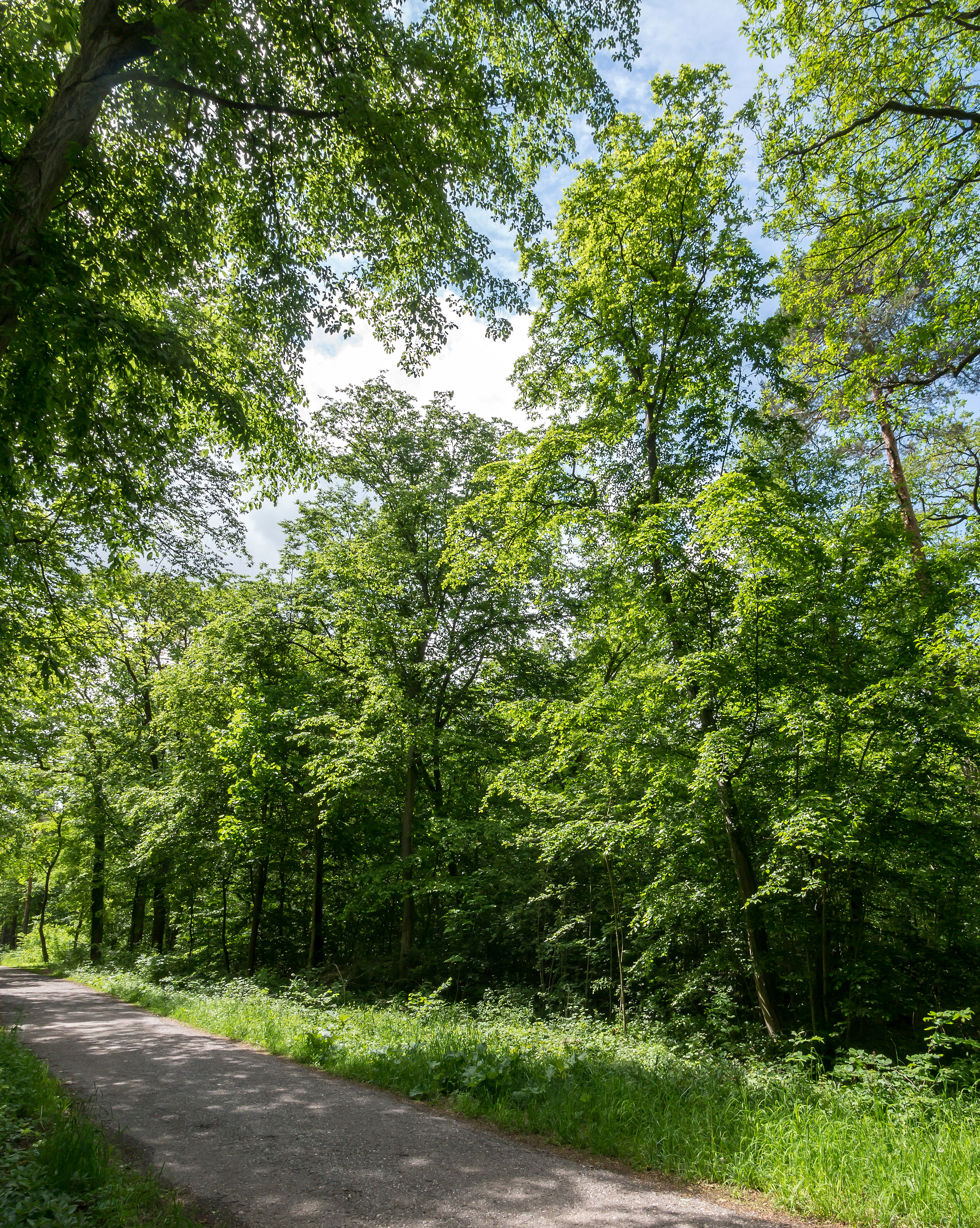 Hainbuchen Doc.-Nr. 1963-11 Jenaer Forst II Naturdenkmal Jena